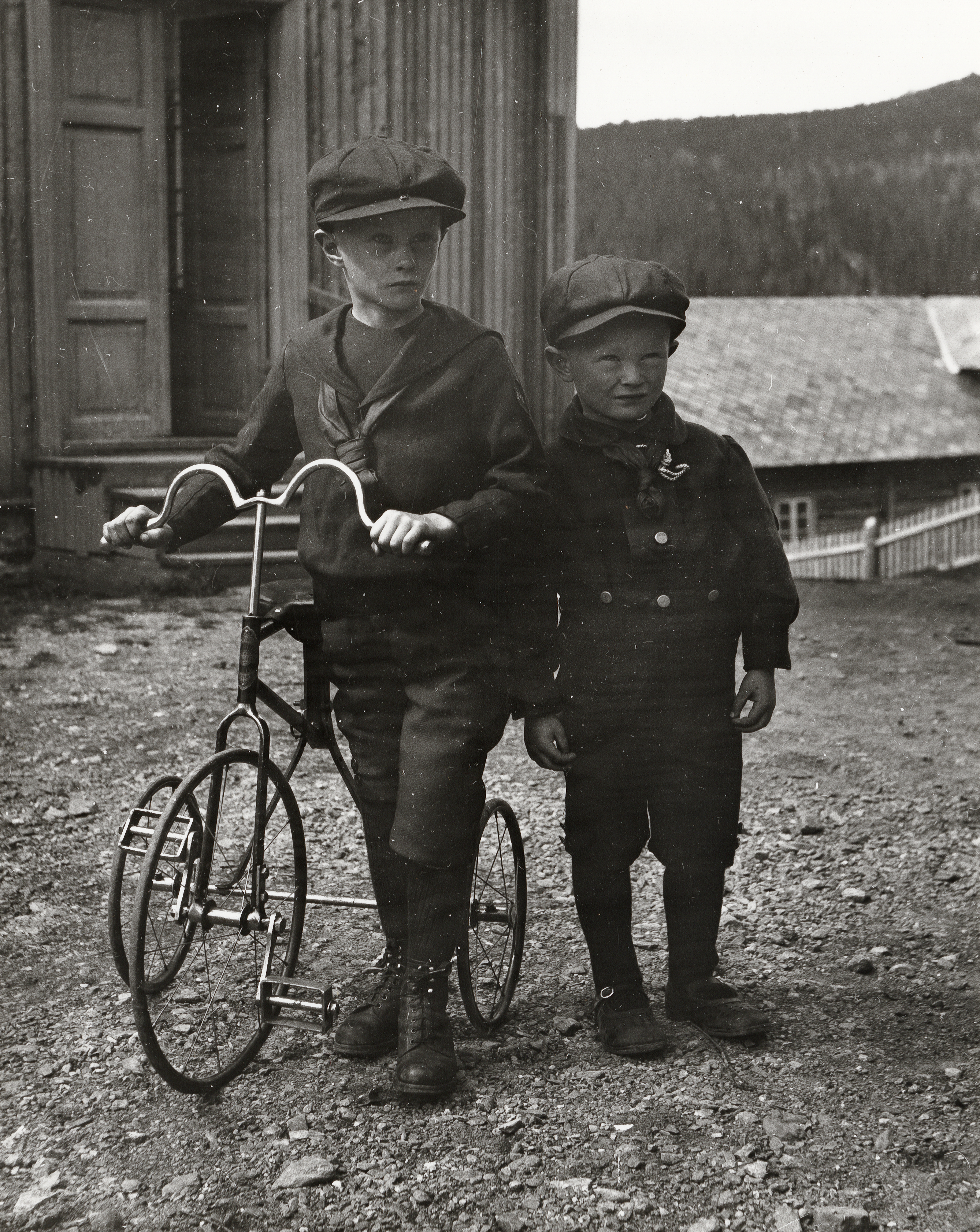 Bjølstad i Heidal, Oppland This image on crowdsourcing geotagging platform Fotodugnad